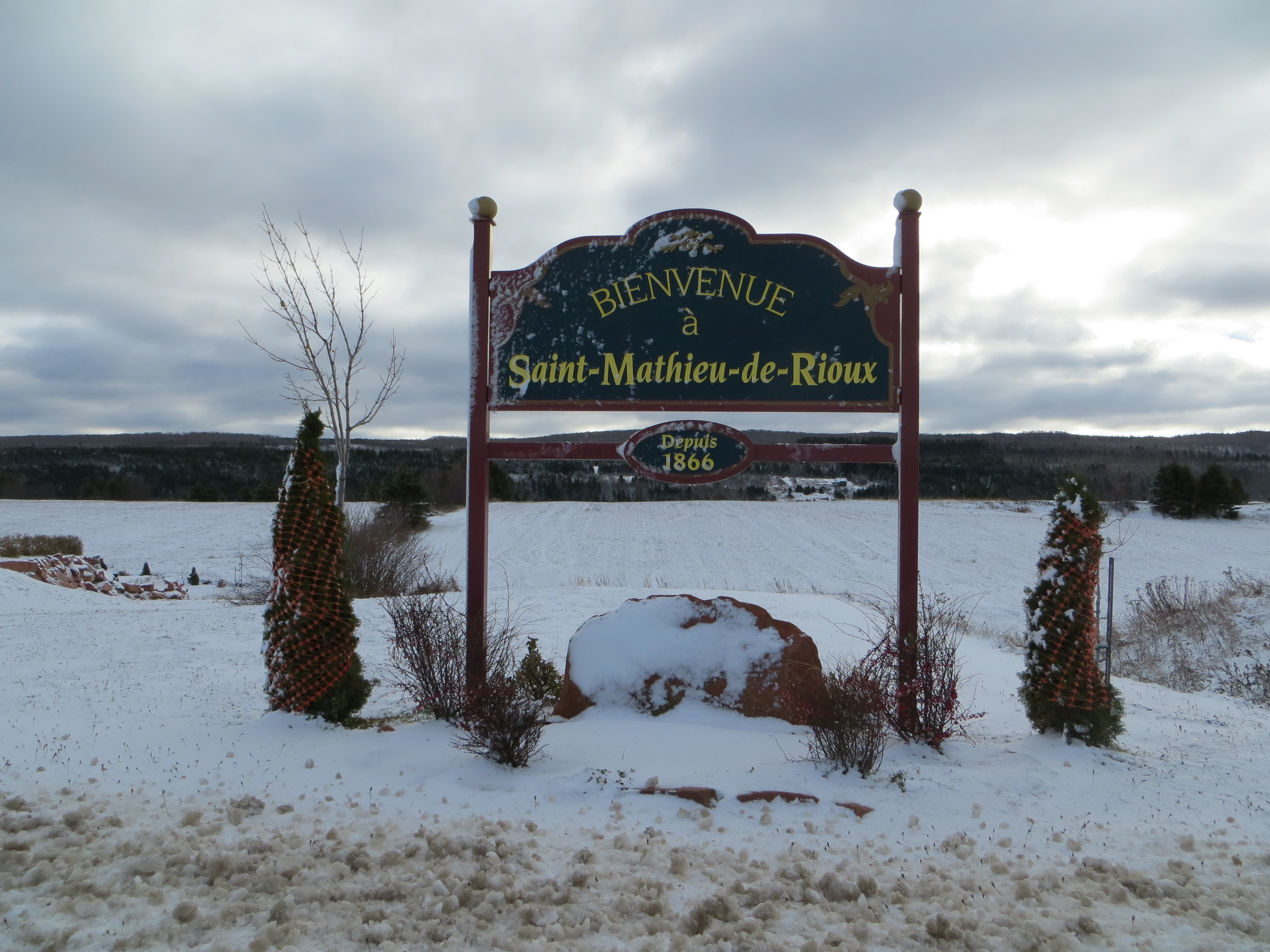 Aviso de bienvenida de Saint-Mathieu-de-Rioux.